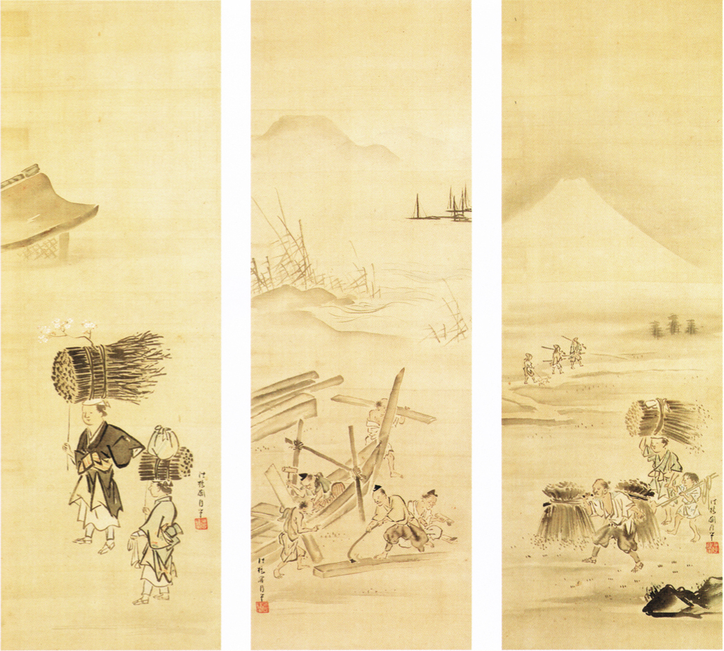 蔀関月「士農工商図」 関西大学所蔵